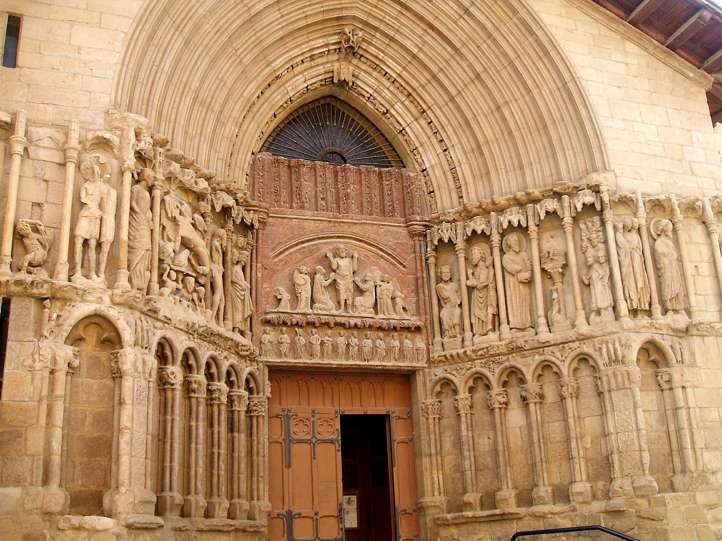 Iglesia de San Bartolomé, Logroño (La Rioja)